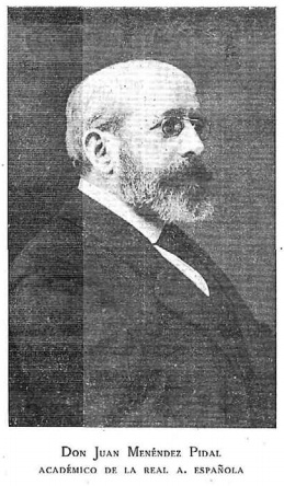 Juan Menéndez Pidal, académico de la Real Academia Española